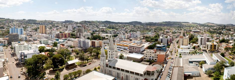 Vista parcial de Xanxerê